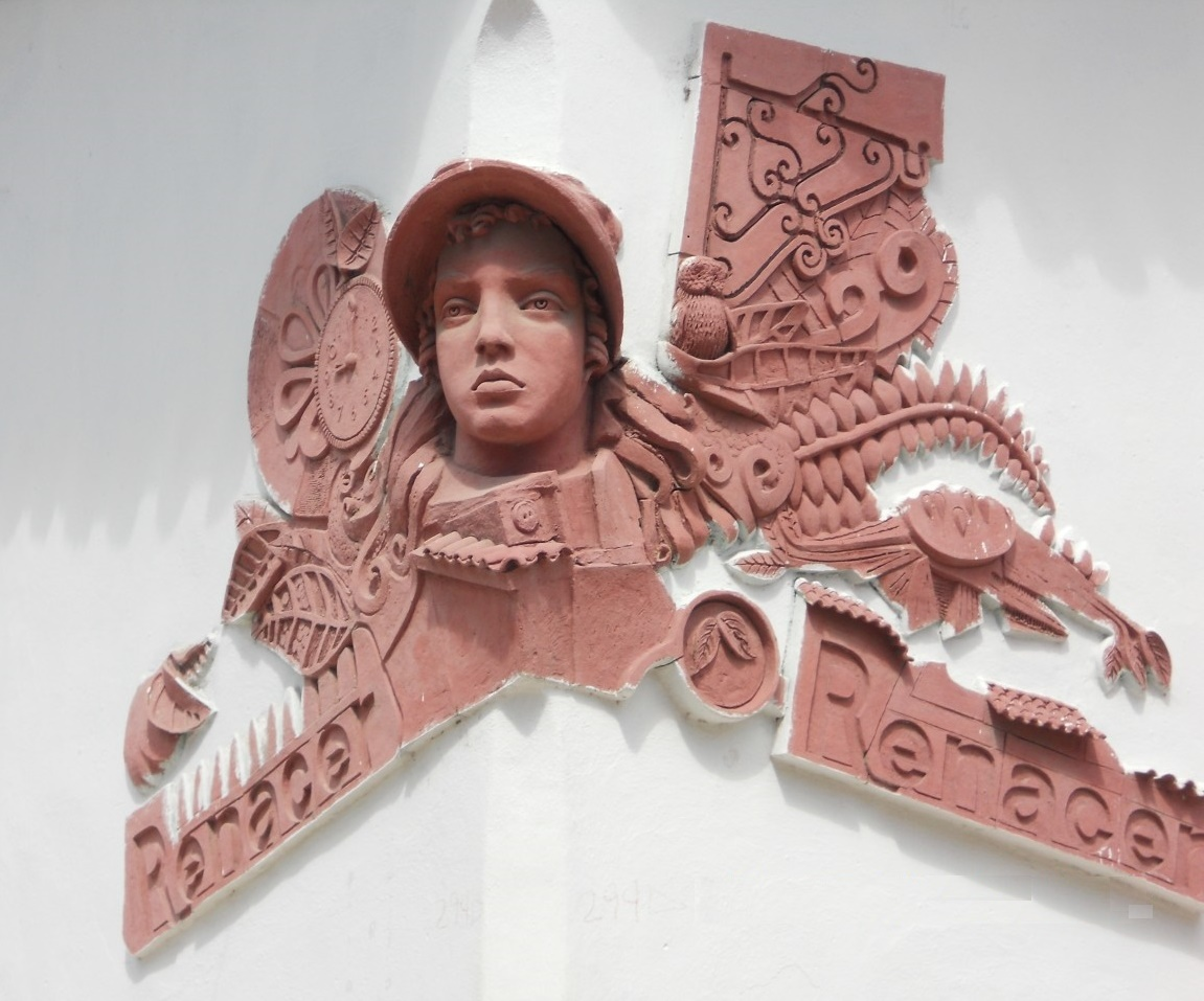 Artesania en barro